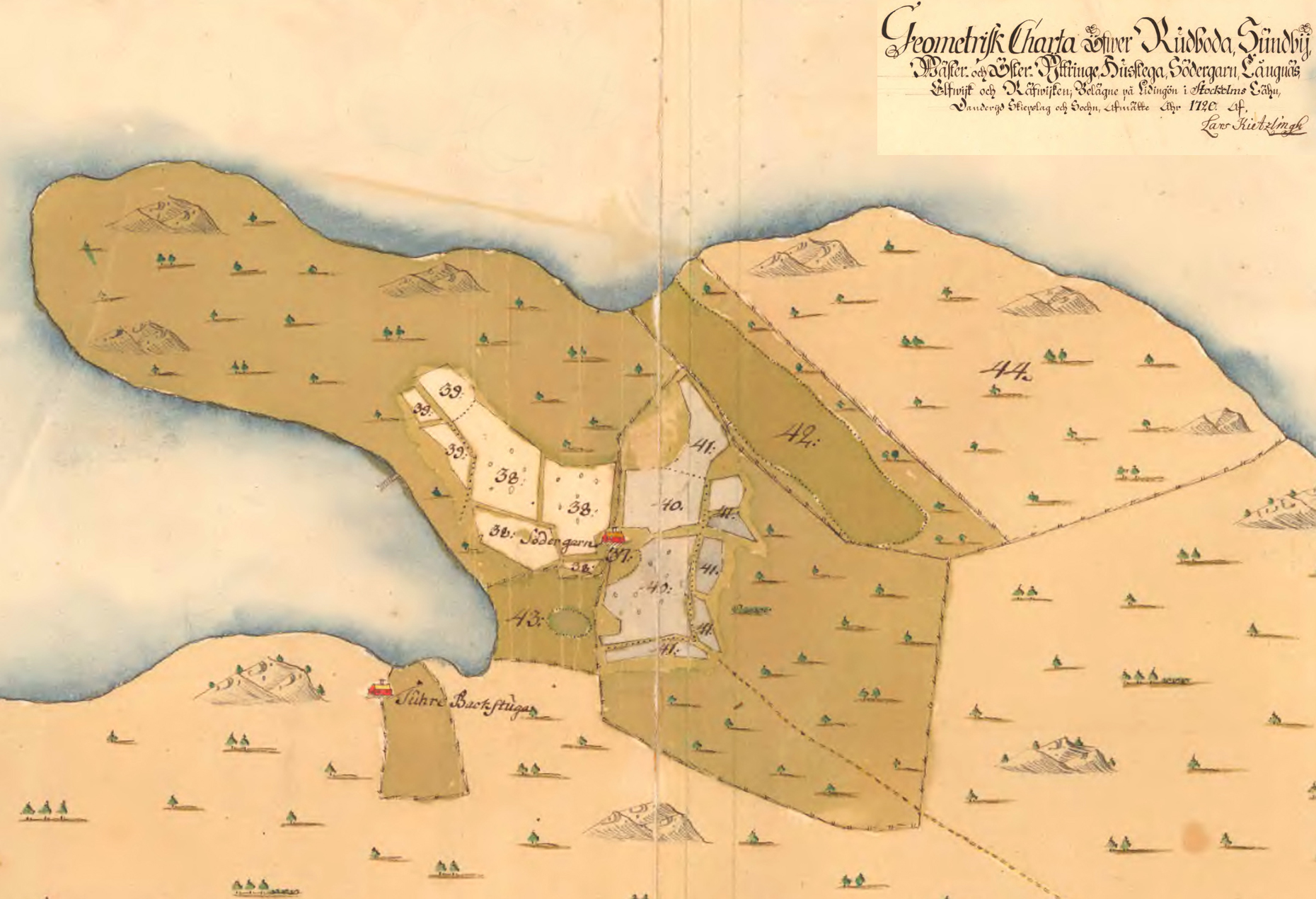 Karta över gårdarna på Elfvikslandet, Lidingö kommun, upprättad av lantmätare Lars Kietzlingh 1720. Del av kartan omfattande Södergarns lantbruksgård.